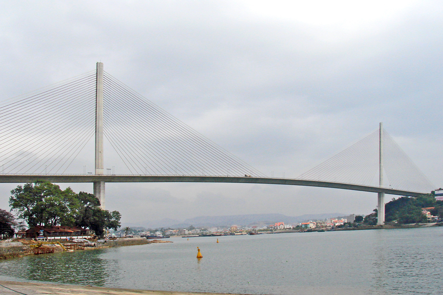 Cầu Bãi Cháy. Ce pont, mis en service il y a quelques années, permet de relier Bai Chay à Hong Gai.